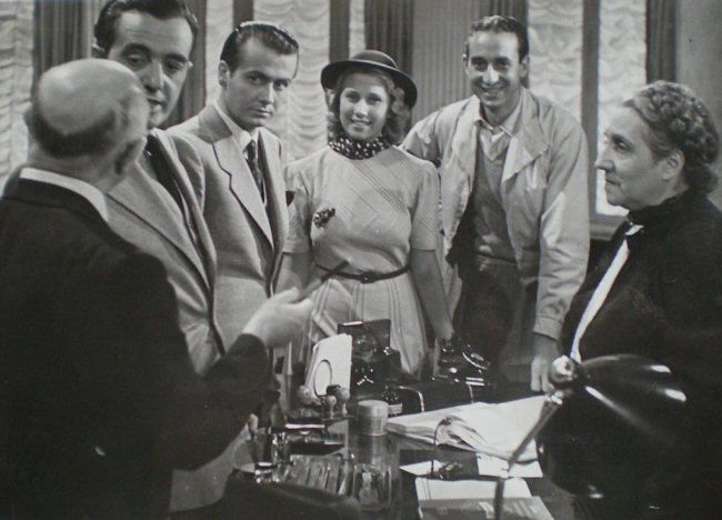 Sul set di Maddalena... zero in condotta, regia di Vittorio De Sica